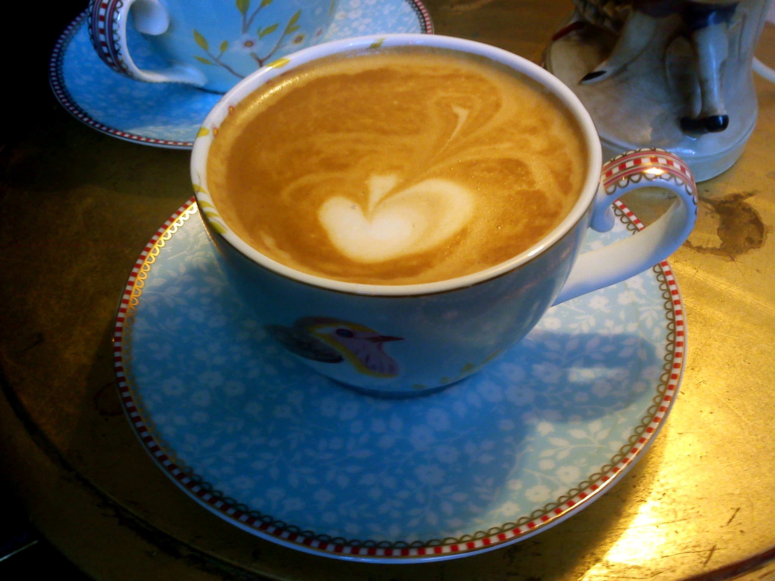 Caffe latte